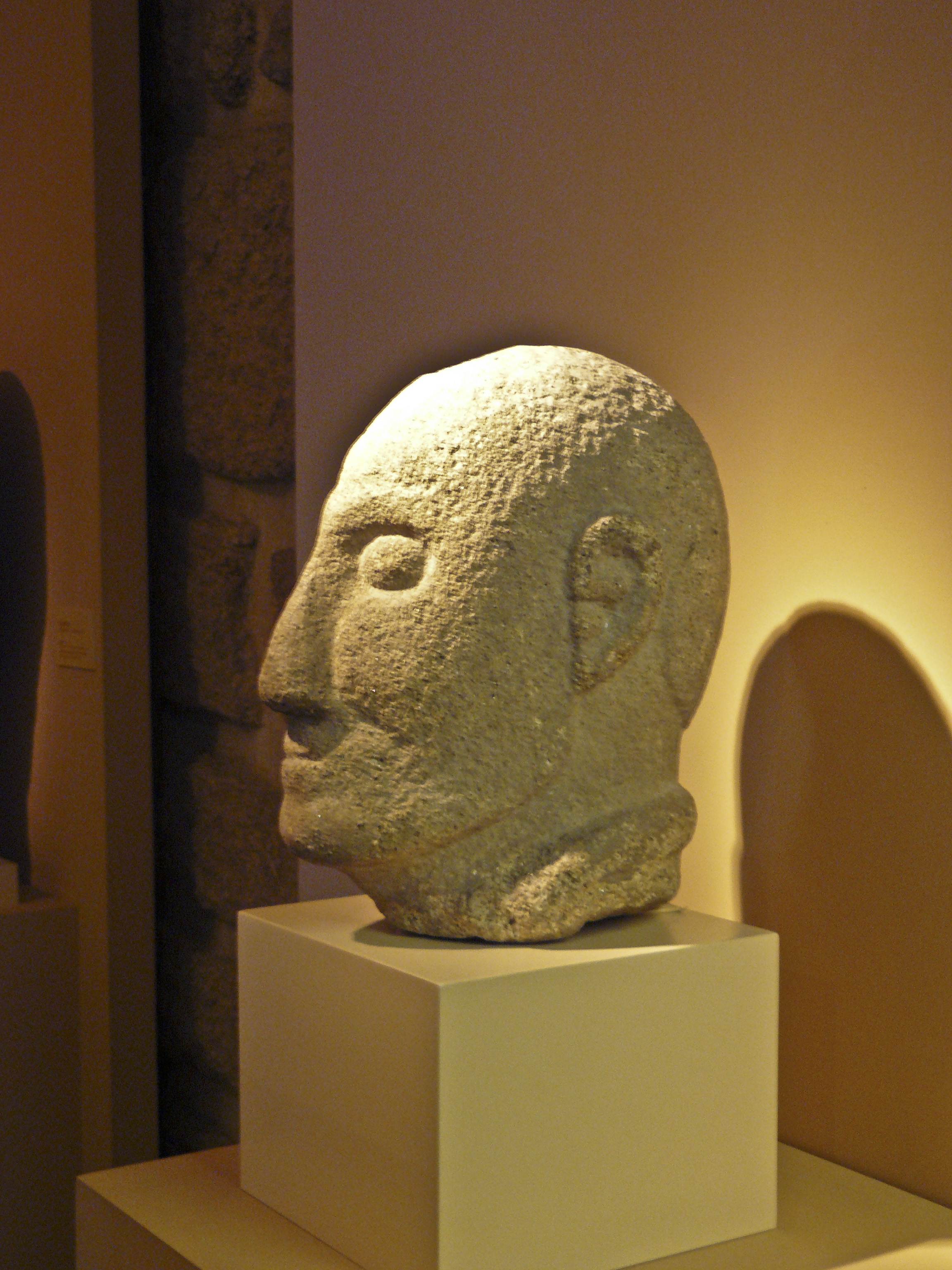 Lateral da cabeza de guerreiro castrexo de Rubiás no concello de Bande